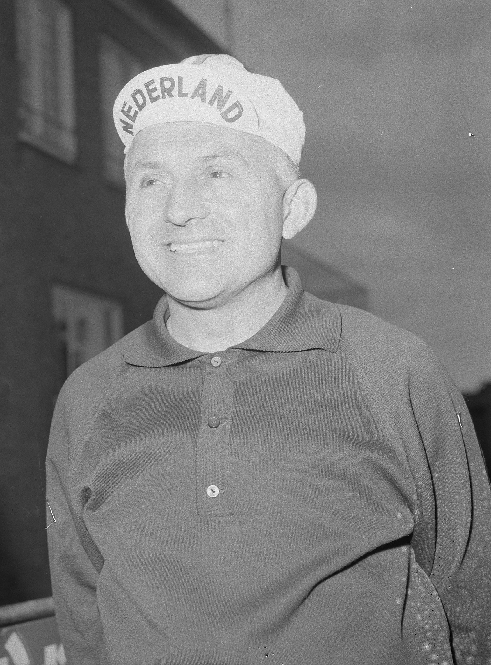 Collectie / Archief : Fotocollectie Anefo Reportage / Serie : [ onbekend ] Beschrijving : Wielrenners Tour de lAvenir , Sjefke Janssen (ploegleider) Datum : 27 juni 1965 Trefwoorden : wielrenners Instellingsnaam : Tour de l'Avenir Fotograaf : Voets, Jan / Anefo Auteursrechthebbende : Nationaal Archief Materiaalsoort : Negatief (zwart/wit) Nummer archiefinventaris : bekijk toegang 2.24.01.03 Bestanddeelnummer : 917-9092